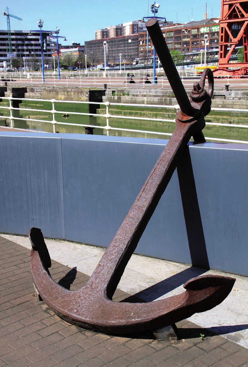 Aingura Itsas Museoaren ondoan, Bilboko itsasadarrean.